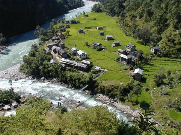 नेपाली: दोलखाको सिंगटी